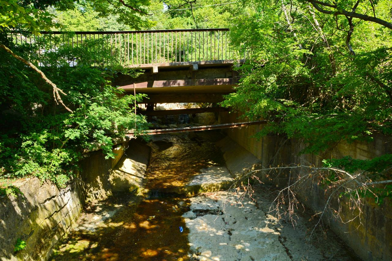 Мост через реку Хаста-Баш на Старом шоссе Севастополь-Ялта